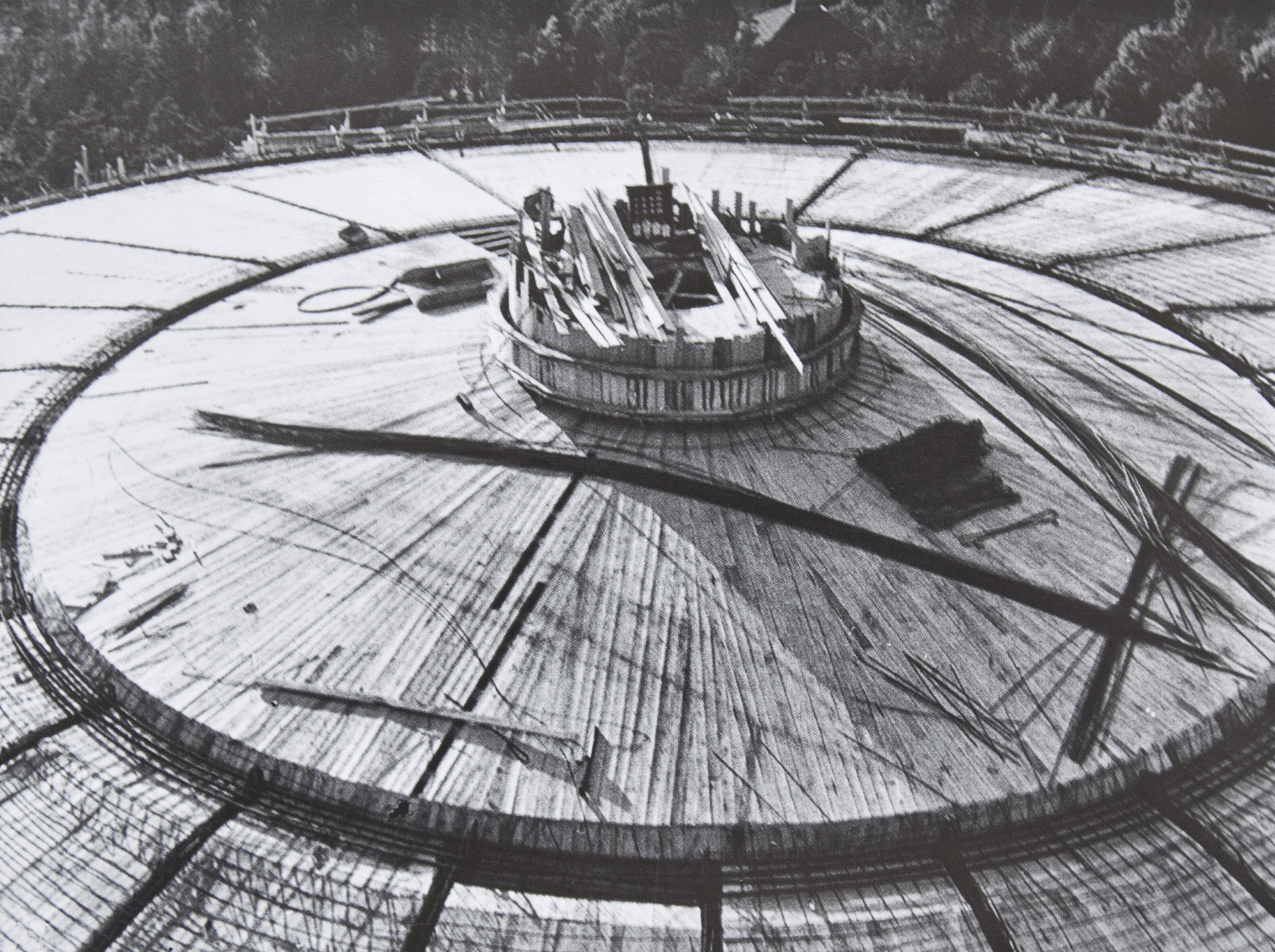 Vesitornin katon betoniraudoitus käynnissä loppukesällä 1958.